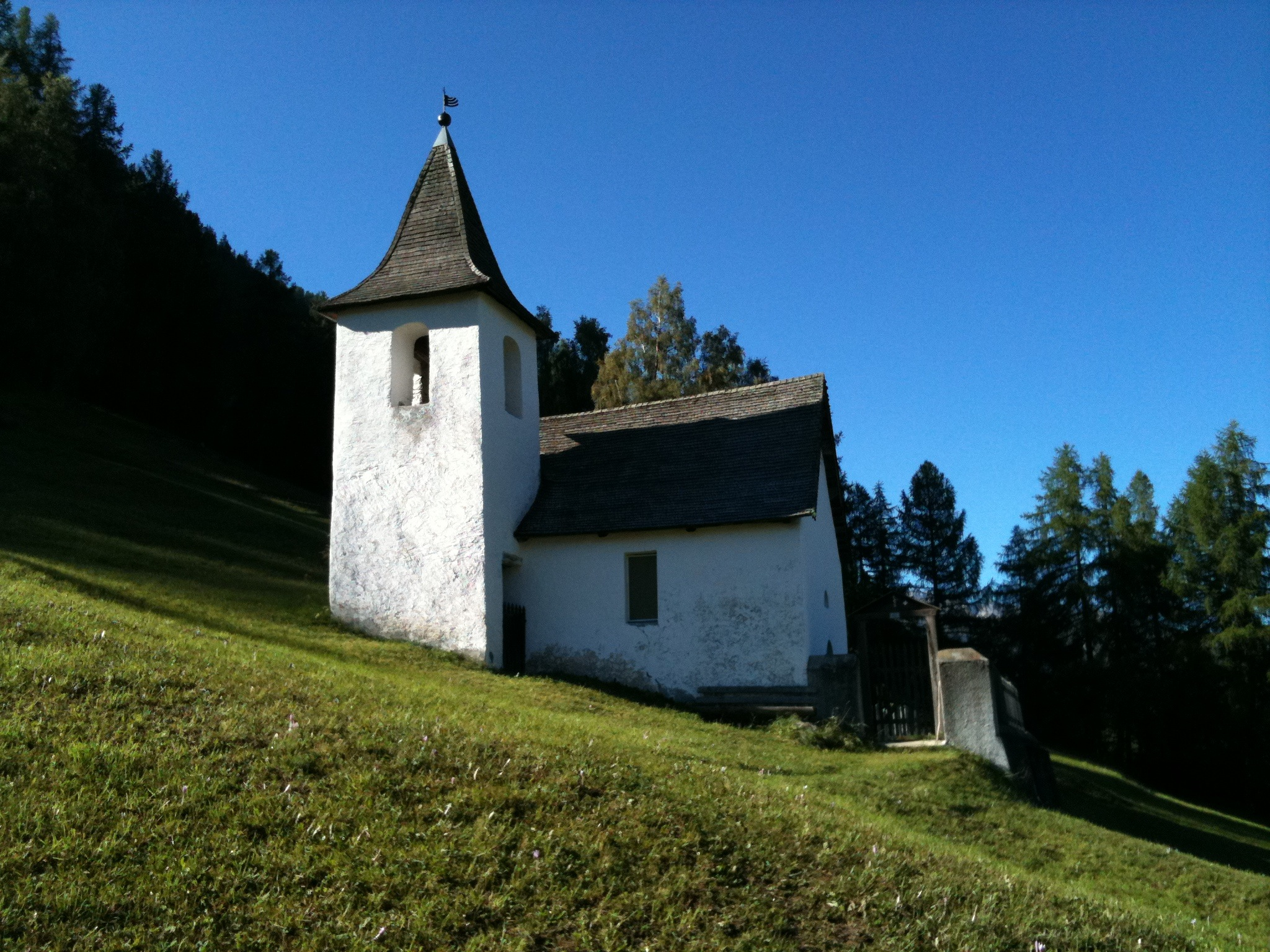 reformierte Kirche Jenisberg (zu Filsur gehörig) im Kanton Graubünden